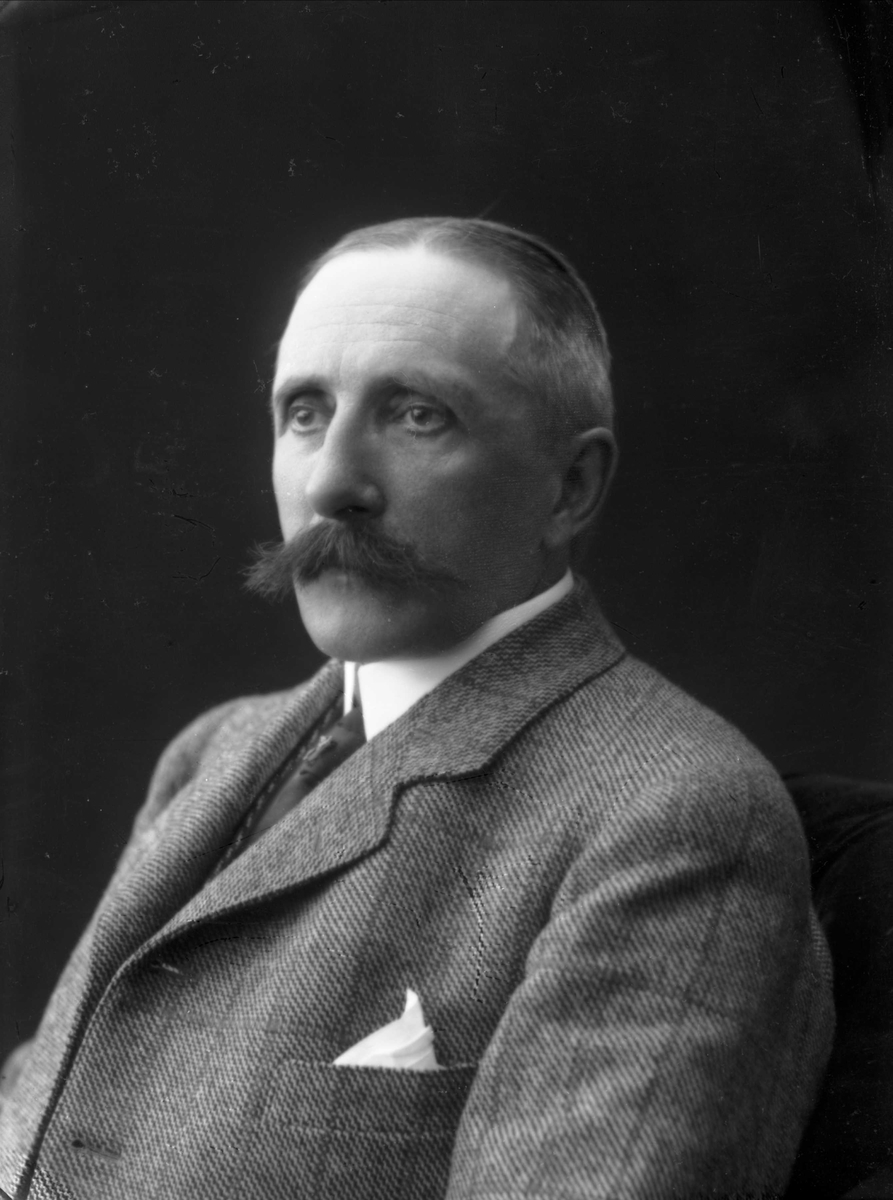 Kristian Brandt, norsk lege.